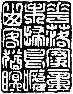 中文（香港）: 東皋心越刻花落家童未扫鸟啼山客犹眠印